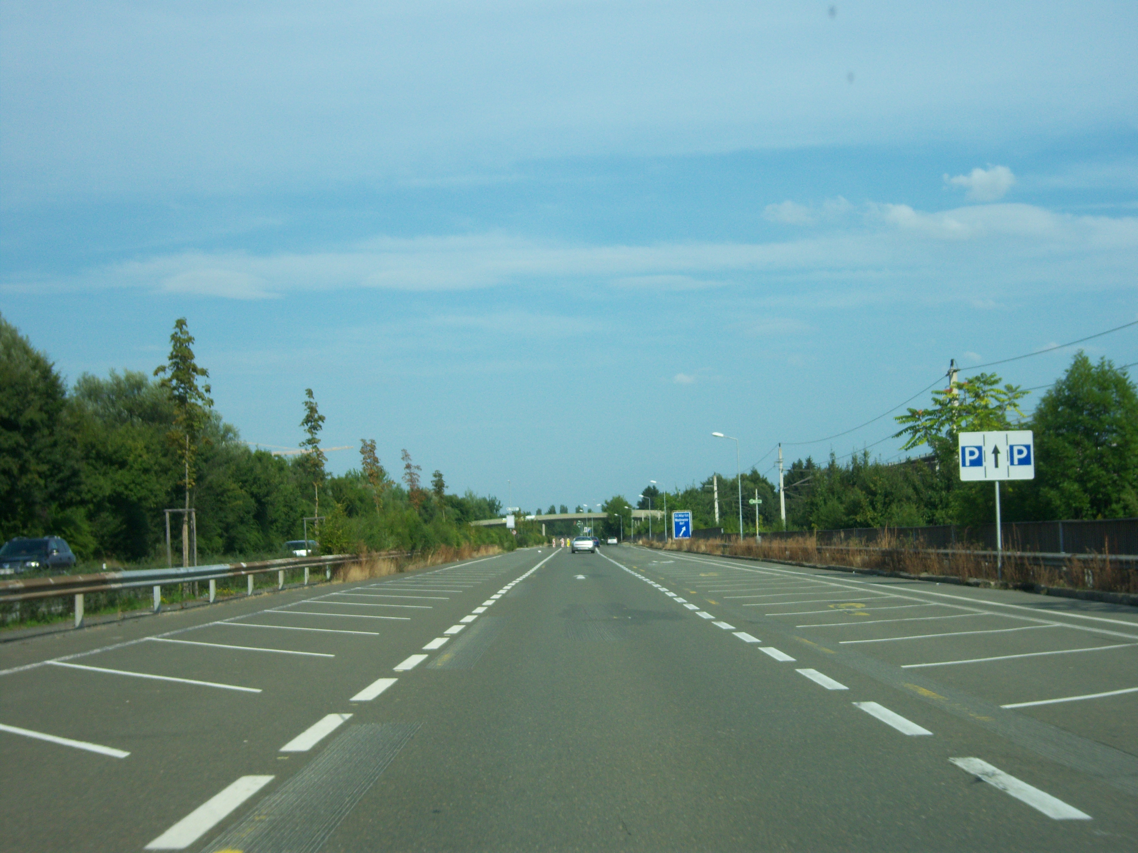 Autobahnzubringer Klagenfurt der Süd Autobahn A2: Auf der südlichen Richtungsfahrbahn wurden Parkplätze errichtet.